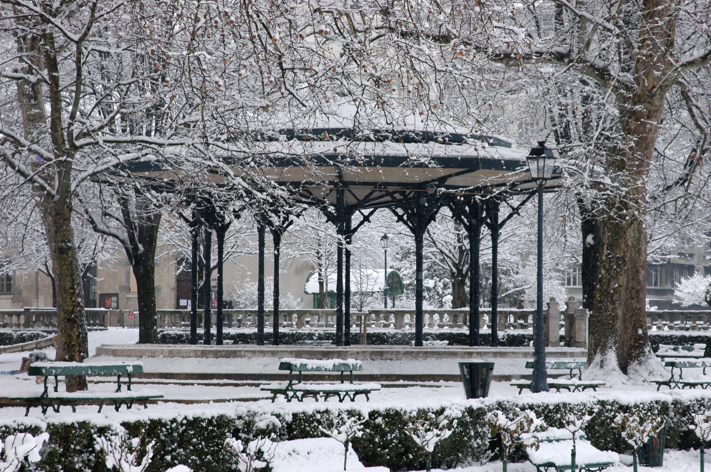 Le kiosque du jardin de ville, Grenoble, France.